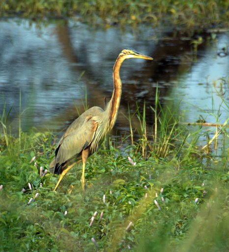 Purple Heron Ardea purpurea